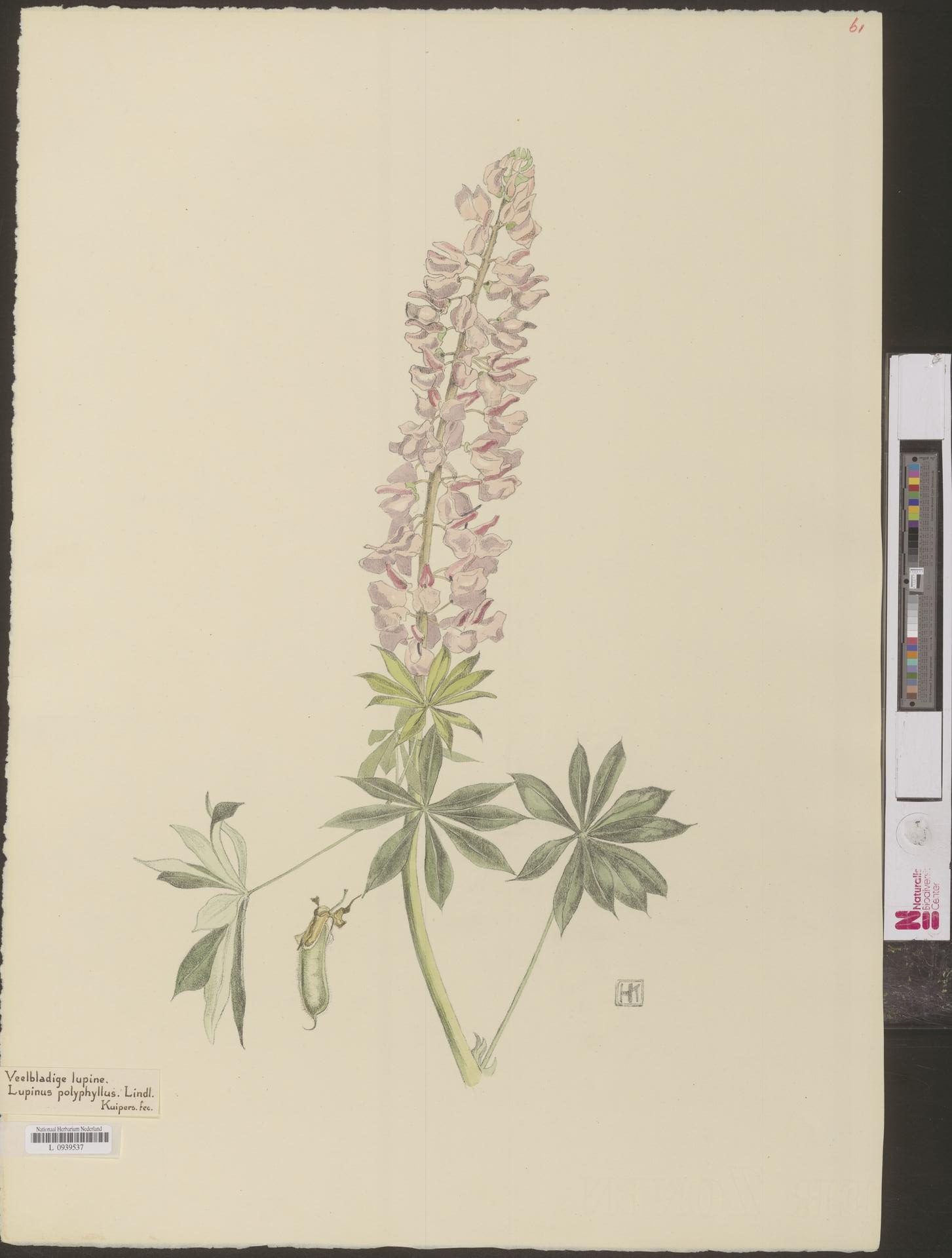 Lupinus polyphyllus Lindley